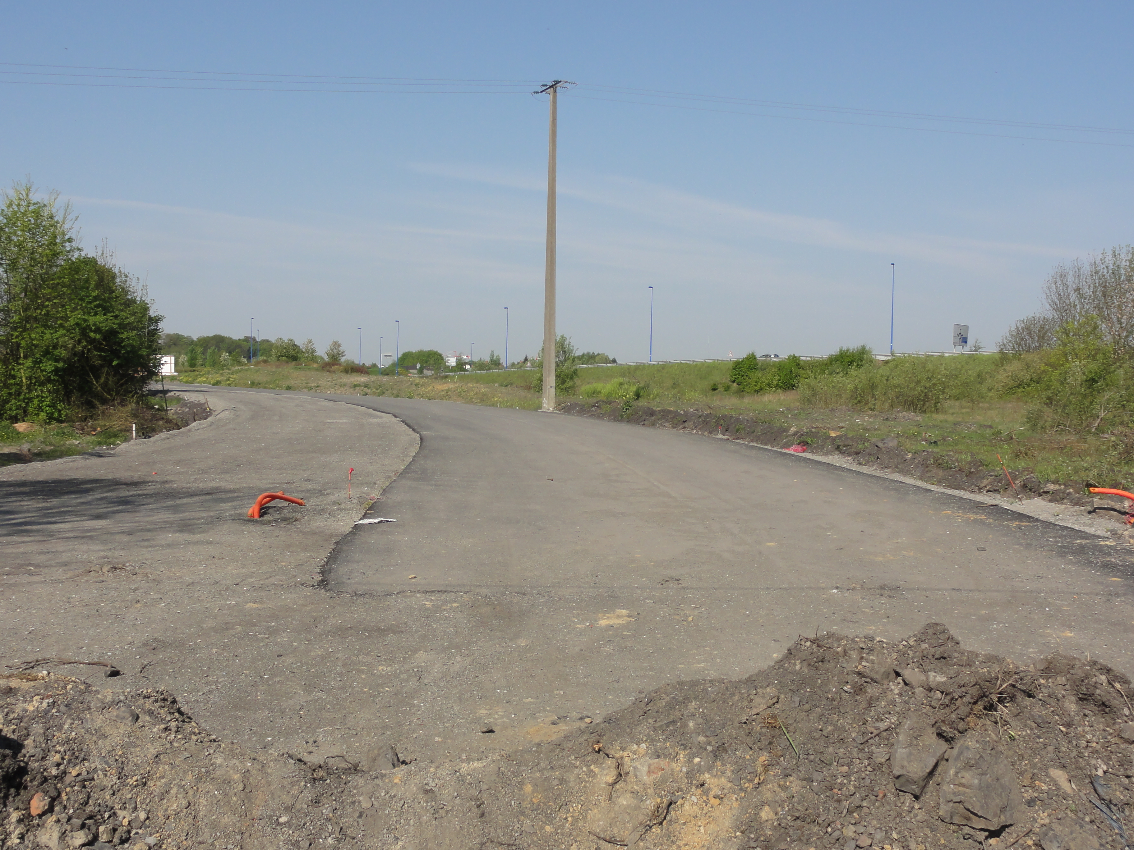 Terril n° 250 dit Cavalier de Bonnel à Barrois, Fosse Bonnel à Barrois, Lallaing, Nord, Nord-Pas-de-Calais, France.